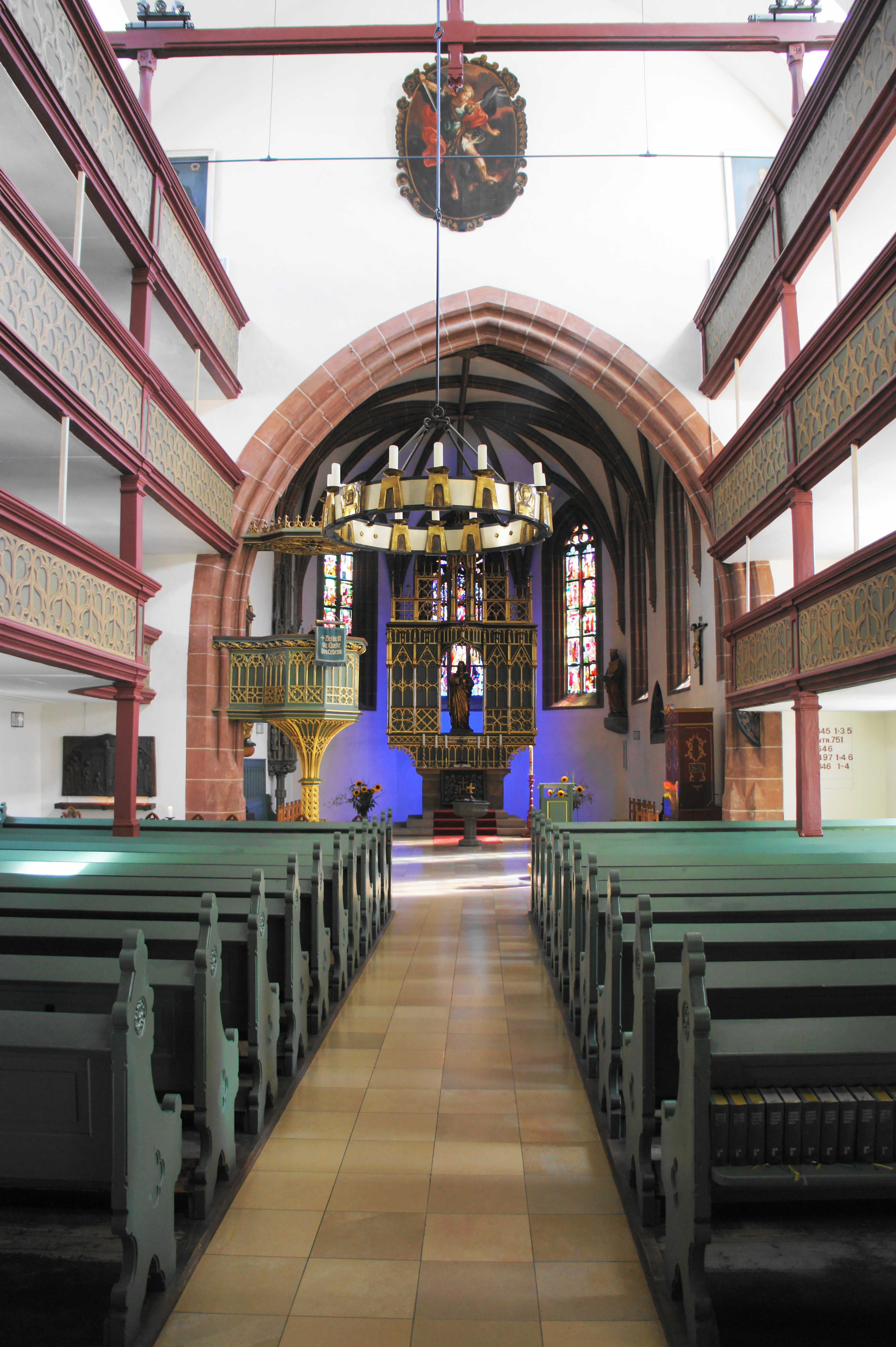 Evangelisch-Lutherische Kirche St. Michael in Fürth. Anfänge stammen aus der Zeit um 1100, sie ist die älteste existierende Kirche in Fürth. Altaraufsatz mit Christusfigur von 1883, neugotisch